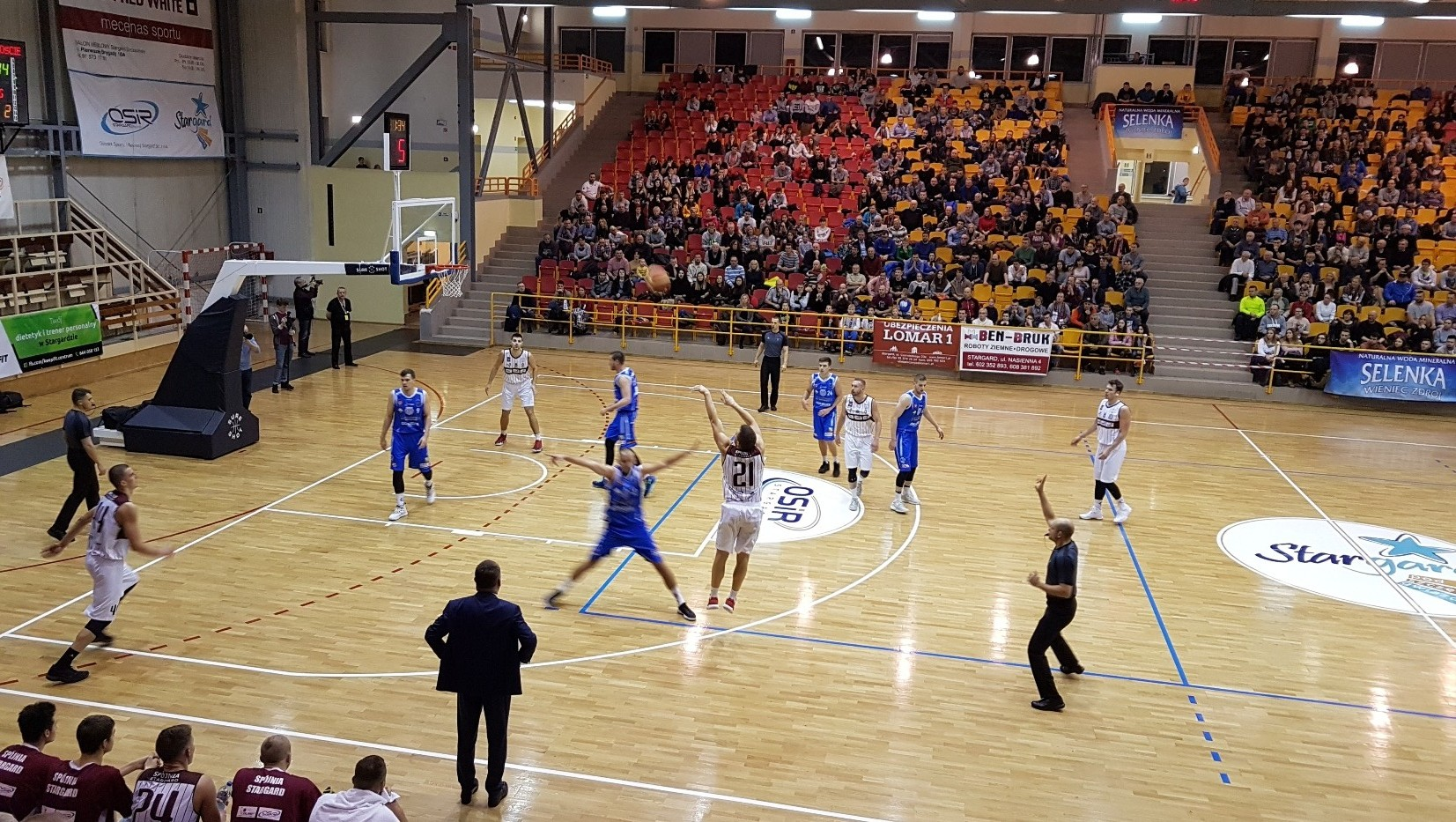 Stargard, 25.11.2017. Spójnia podczas meczu z Pogonią Prudnik